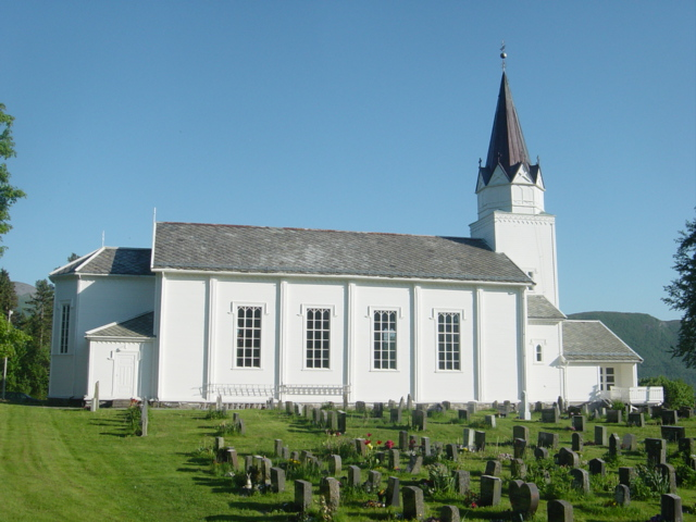 Fræna and the Myrbostad kirke